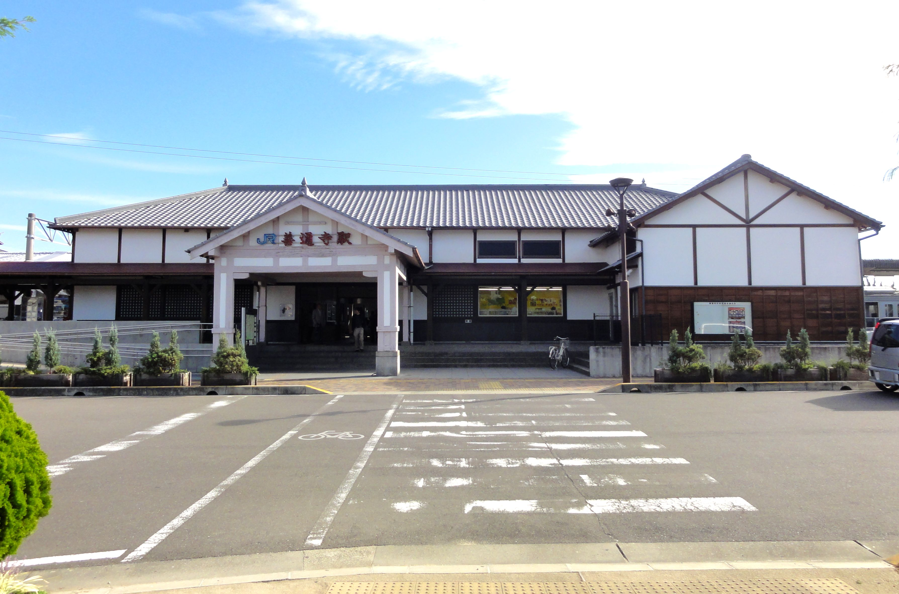 JR四国善通寺駅